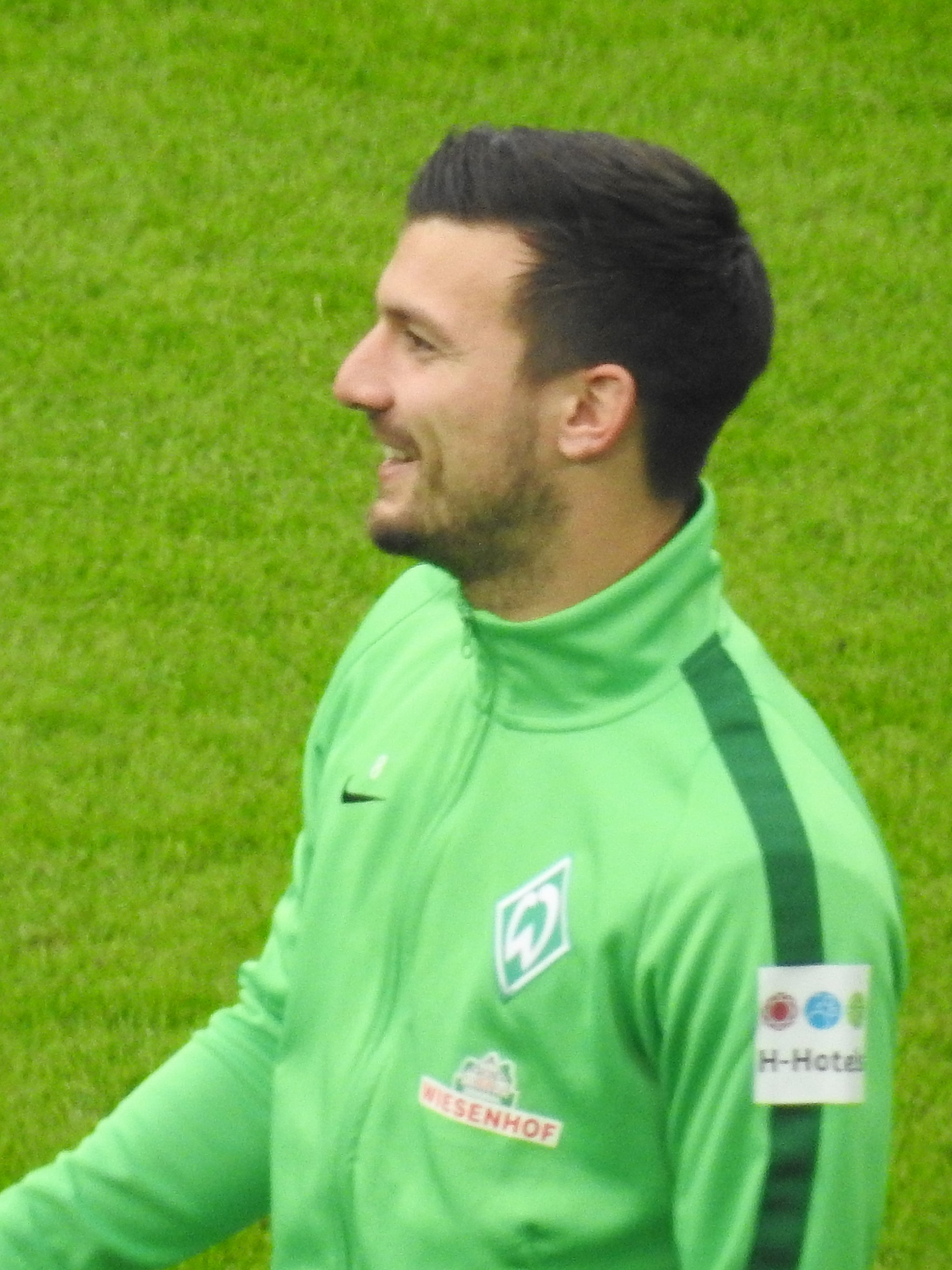 Gondorf, Jérôme Werder Bremen